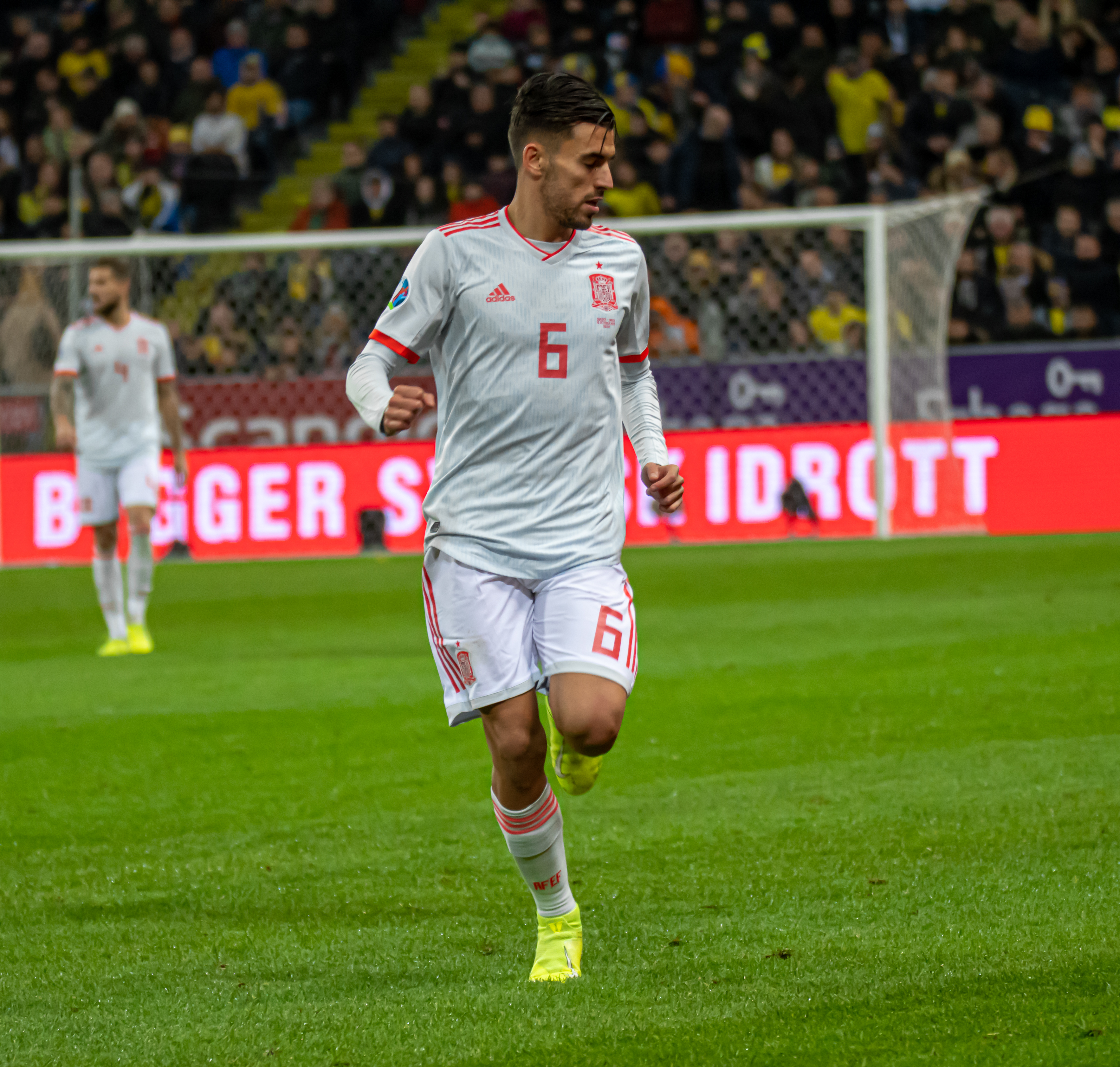 UEFA EURO qualifiers Sweden vs Spain 20191015